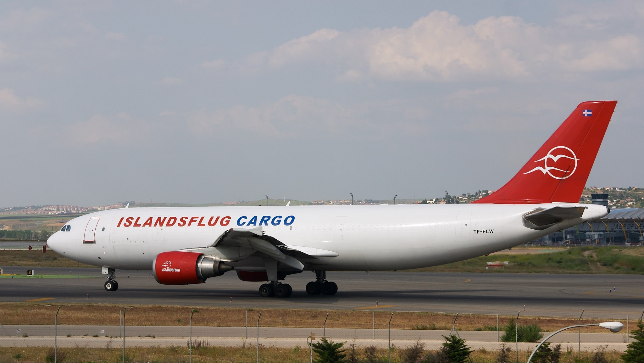 Airbus A300C4-605R dirigiéndose hacia la pista para despegar. Aeropuerto de Madrid Barajas.